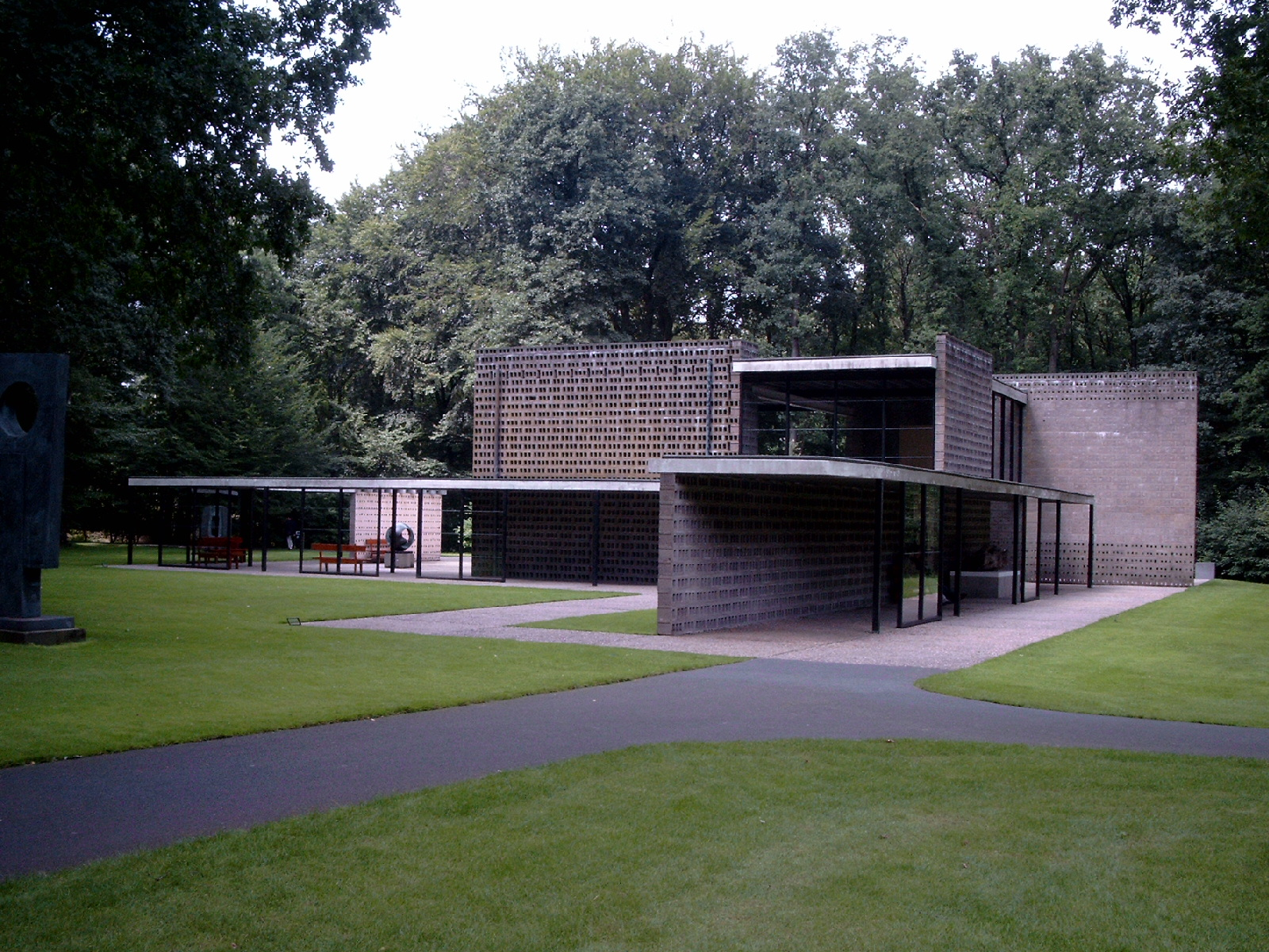 Rietveld paviljoen, 1965, Museum Kröller-Müller, Otterlo, Nederland